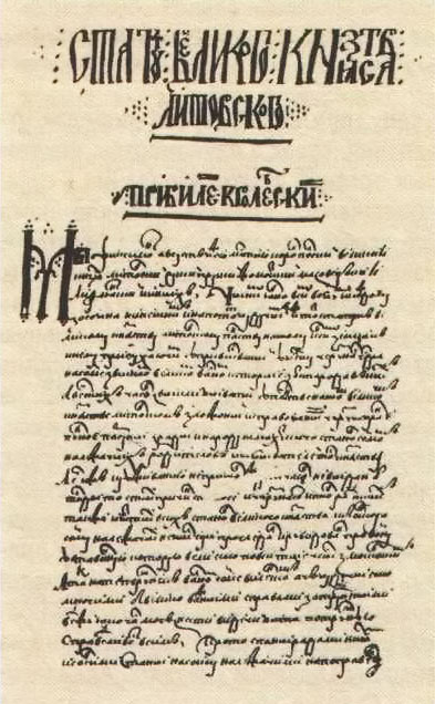 Беларуская (тарашкевіца): Статут Вялікага Княства Літоўскага (Statut Vialikaha Kniastva Litoŭskaha). Віцебскі сьпіс